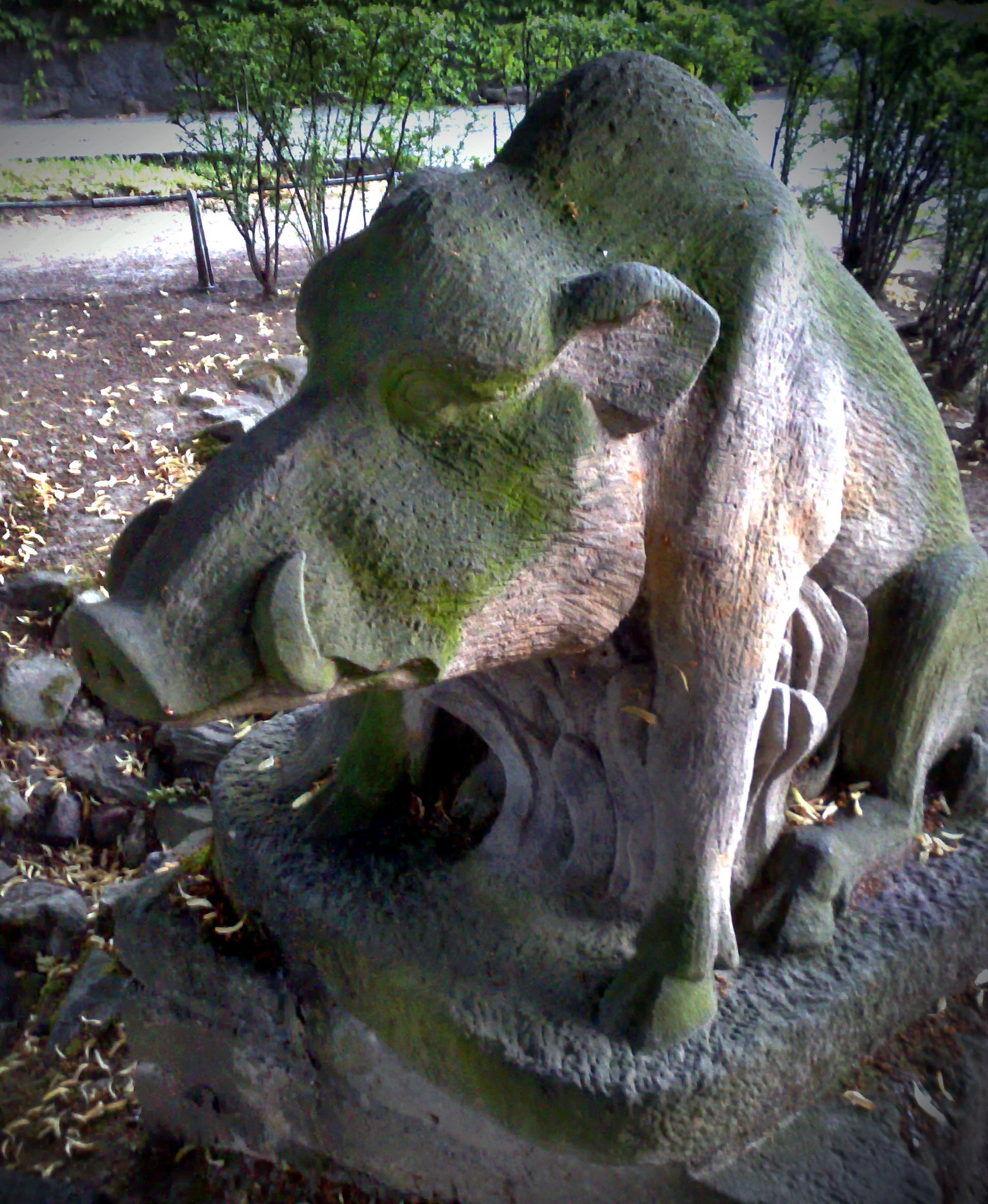 Vor der Evangelischen Kirche in Ebersbach/Sa. gibt es einen kleinen Park, in dem dieser Eber aus Sandstein steht. Der Sage nach hat ein Eber einen Bach aufgegraben und der Stadt Ebersbach dadurch seinen Namen verliehen.